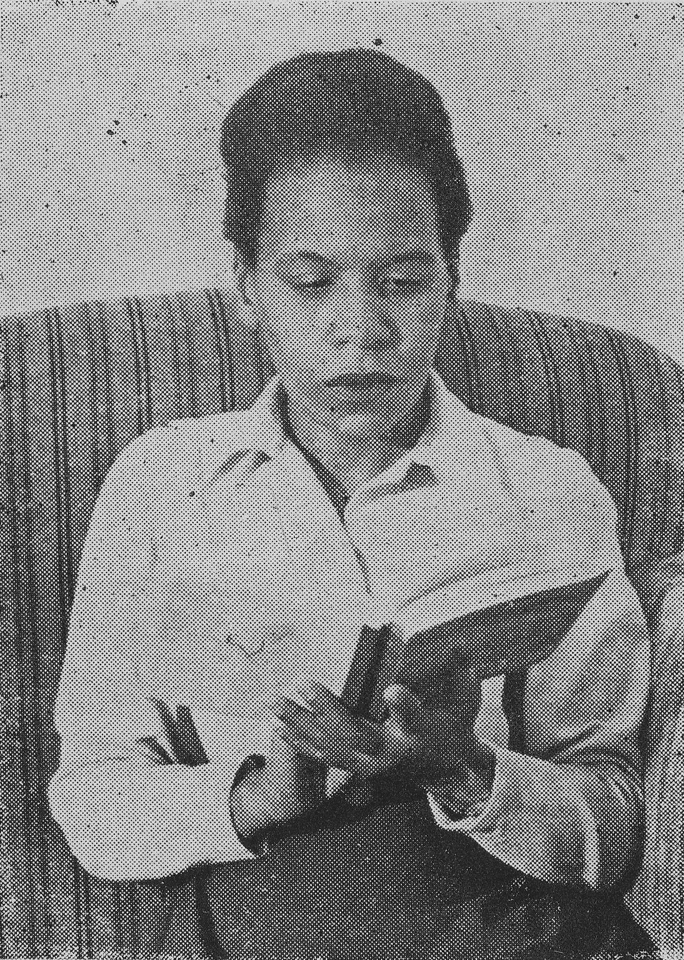 Imagen que acompaña la única edición del libro "Cien cárceles de amor", de Virginia Brindis de Salas (1908-1958), de 1949.